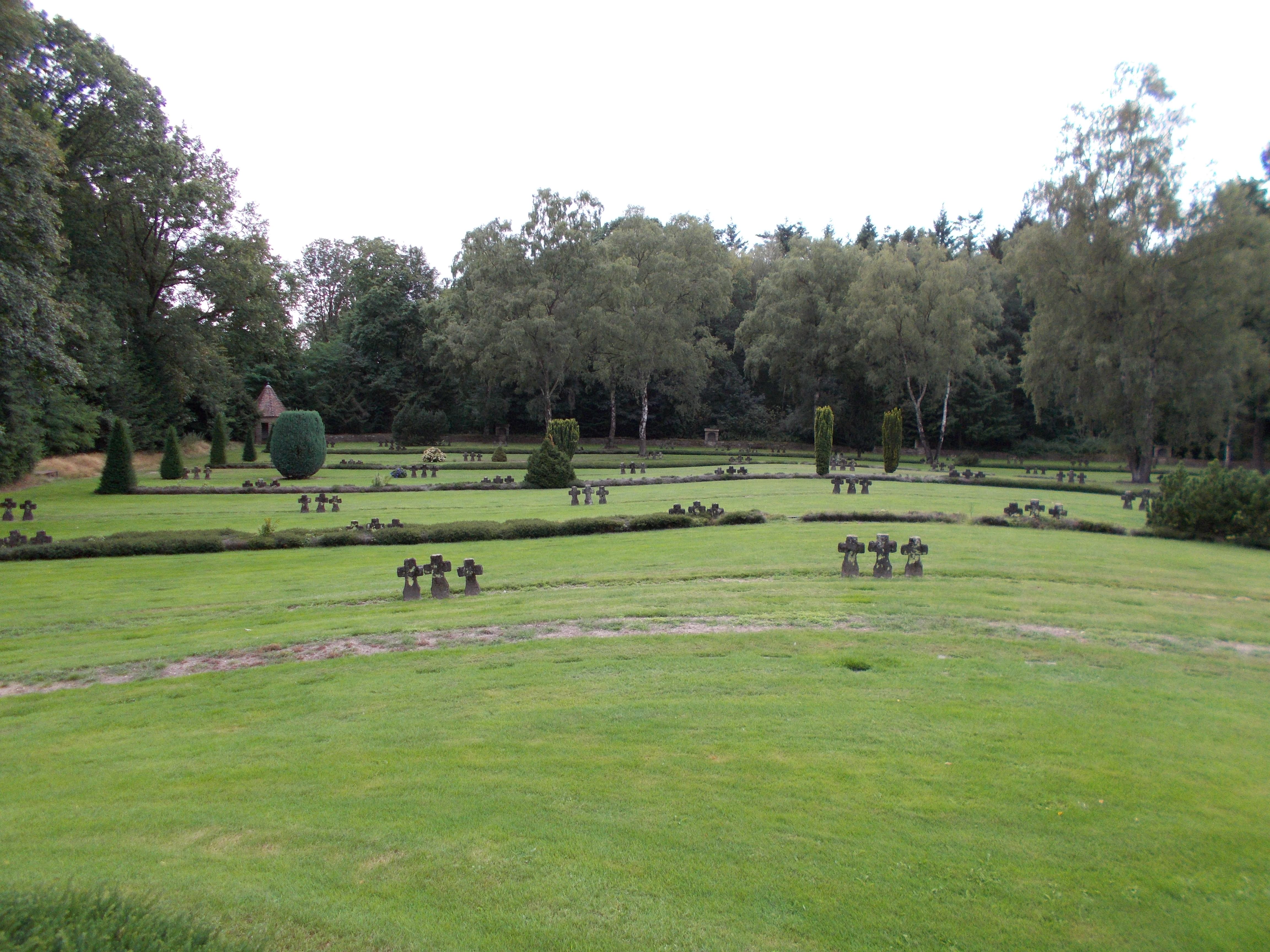 Wie Sühnekreuze wirken die kleinen Basaltkreuze auf dem Gräberfeld. Die Namen der gefallenen Soldaten sind unscheinbar als kleine Steintafeln in die Wiese eingelassen. Begrenzt wird der Friedhof von einer bogenförmigen Mauer mit zwei Kapellenhäuschen.